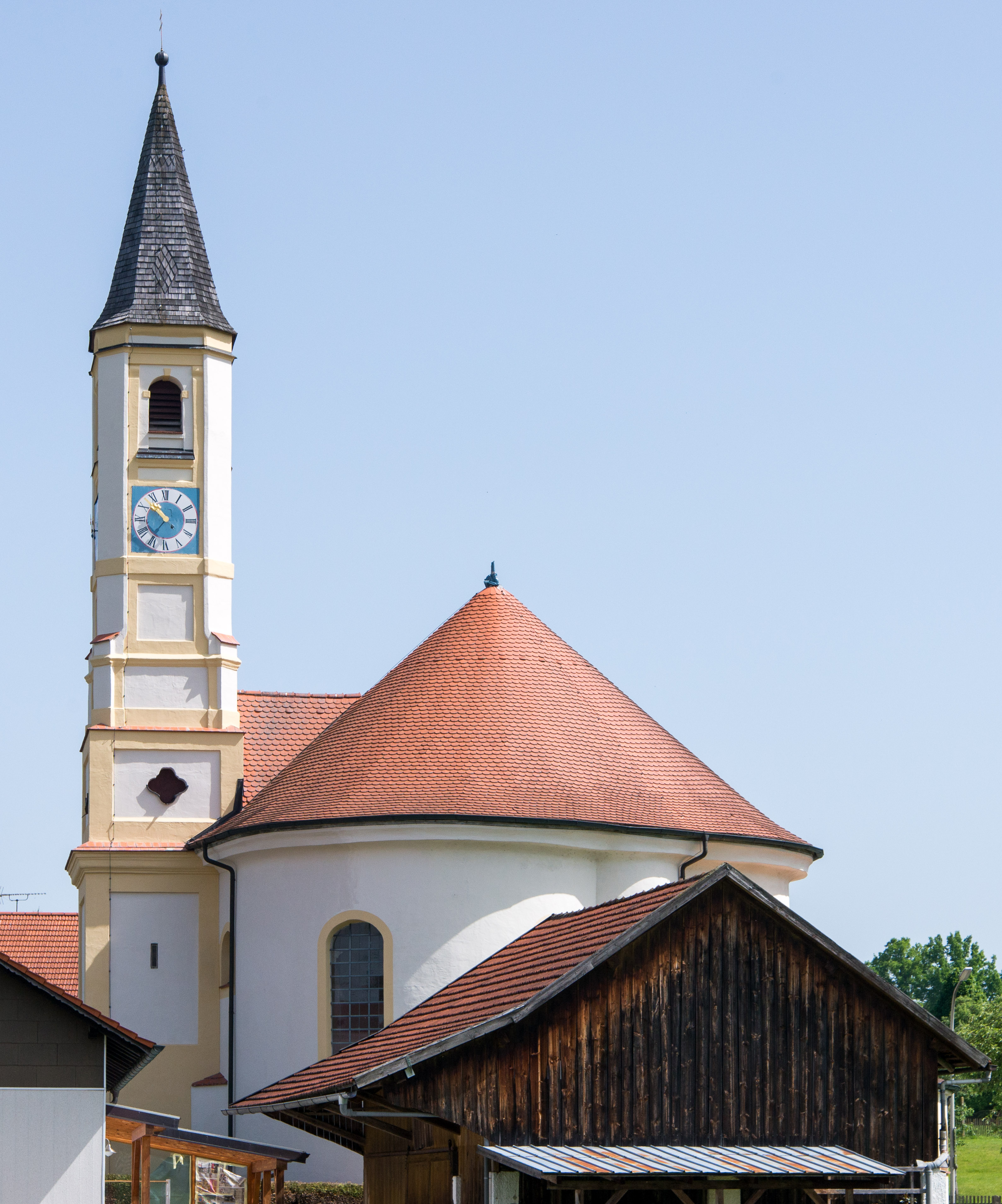 Filialkirche St. Maria von Einsiedeln: Dreikonchenanlage mit vorgelegtem Westturm, Turm über Eingangsvorhalle mit Geschoss- und Putzgliederung, mit Spitzhelm, 1703/04 erbaut, 1818 nach Brandschaden in teilweise vereinfachter Form wiederhergestellt; mit Ausstattung. This is a photograph of an architectural monument.